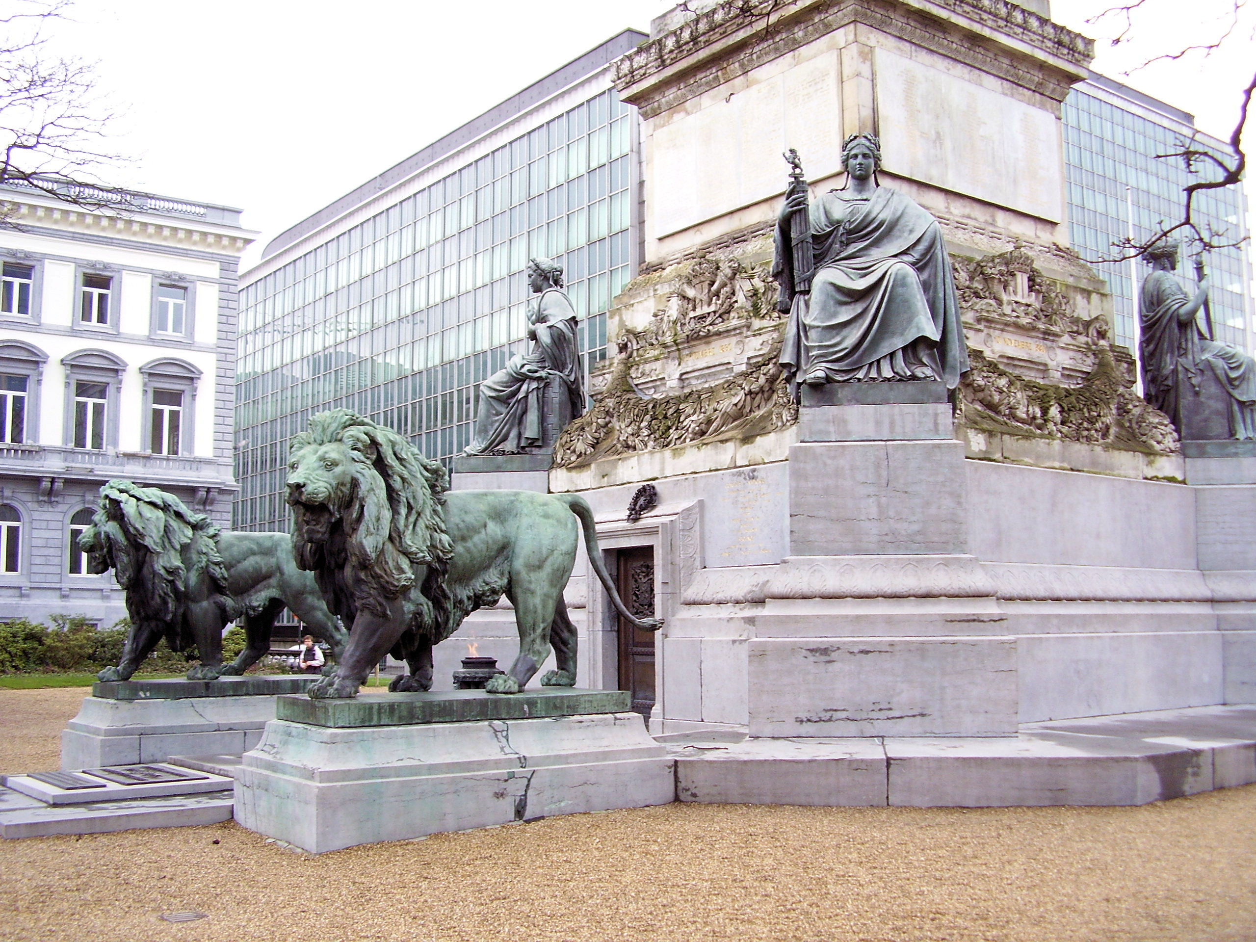 Colonne du Congrès Bruxelles, base du monument, Tombe du soldat inconnu et flamme éternelle, Liberté d'enseignement (gauche), Liberté d’association (centre), Liberté des cultes (droite)